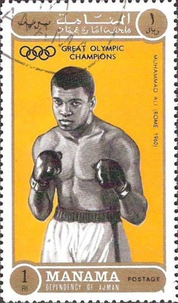 Muhammad Ali